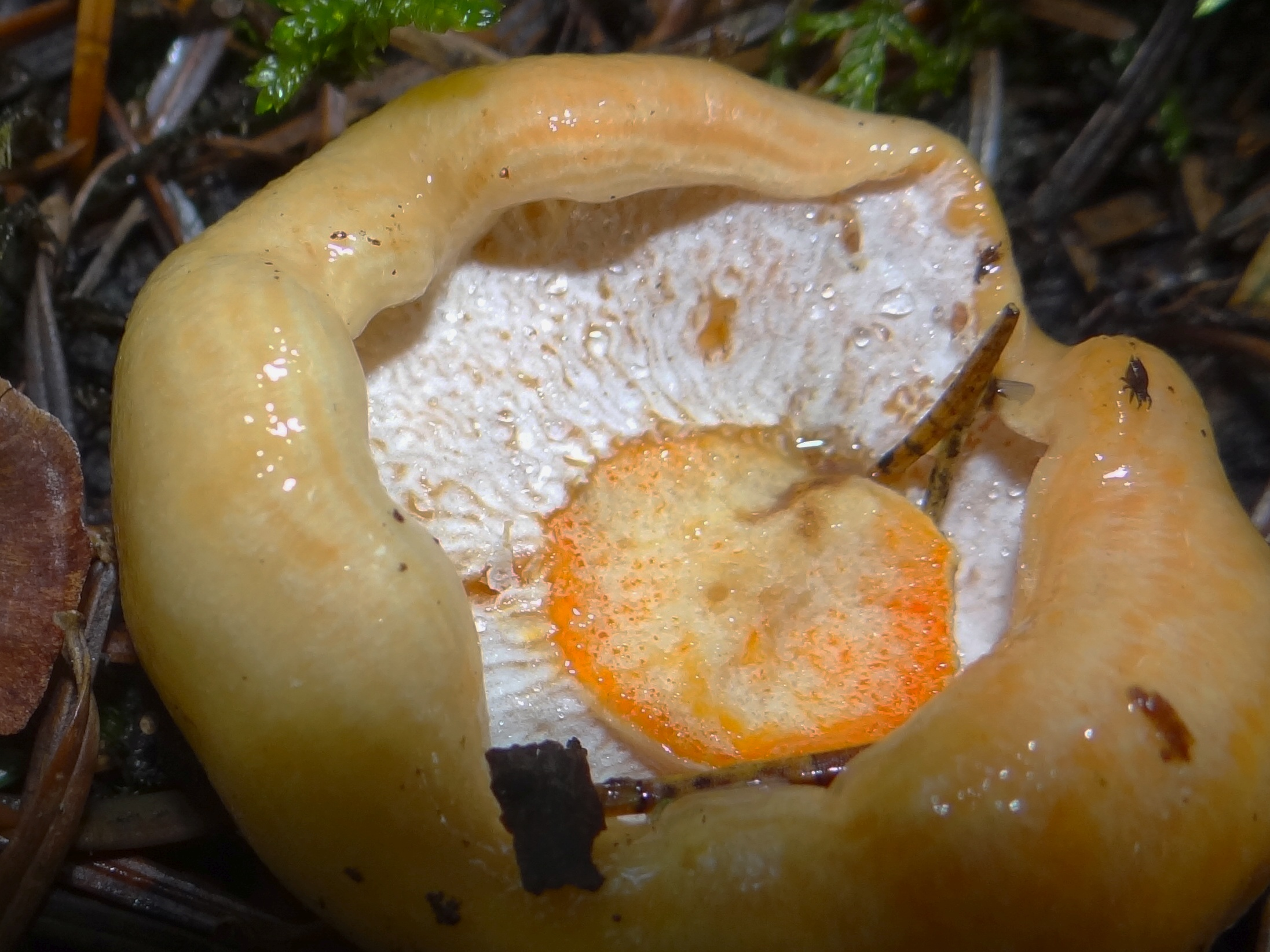 Hypomyces lateritius on Lactarius deterrimus (location: Poland, Kamionna (województwo małopolskie)